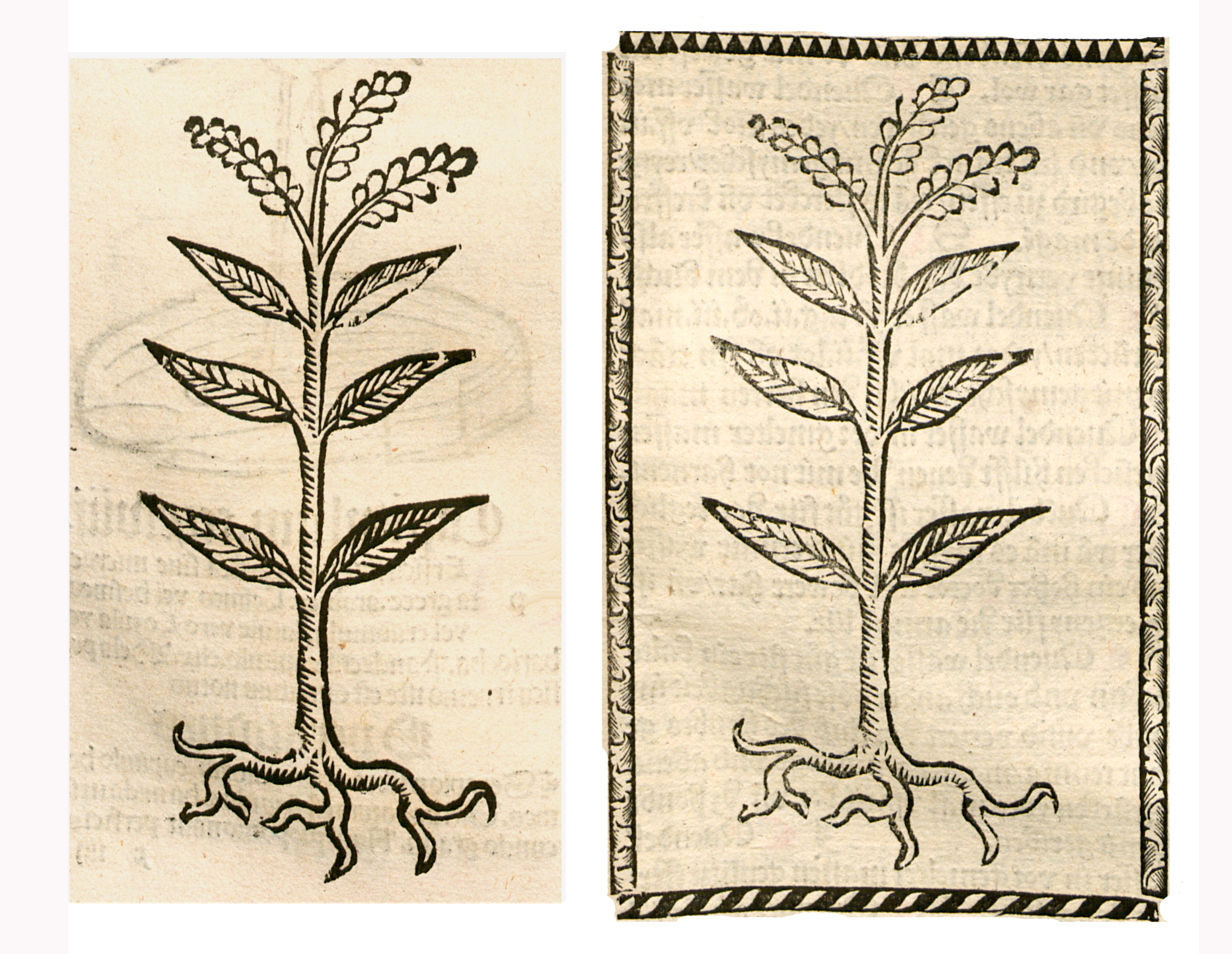 Abbildung von: Phohen Krut (Polygonum persicaria)